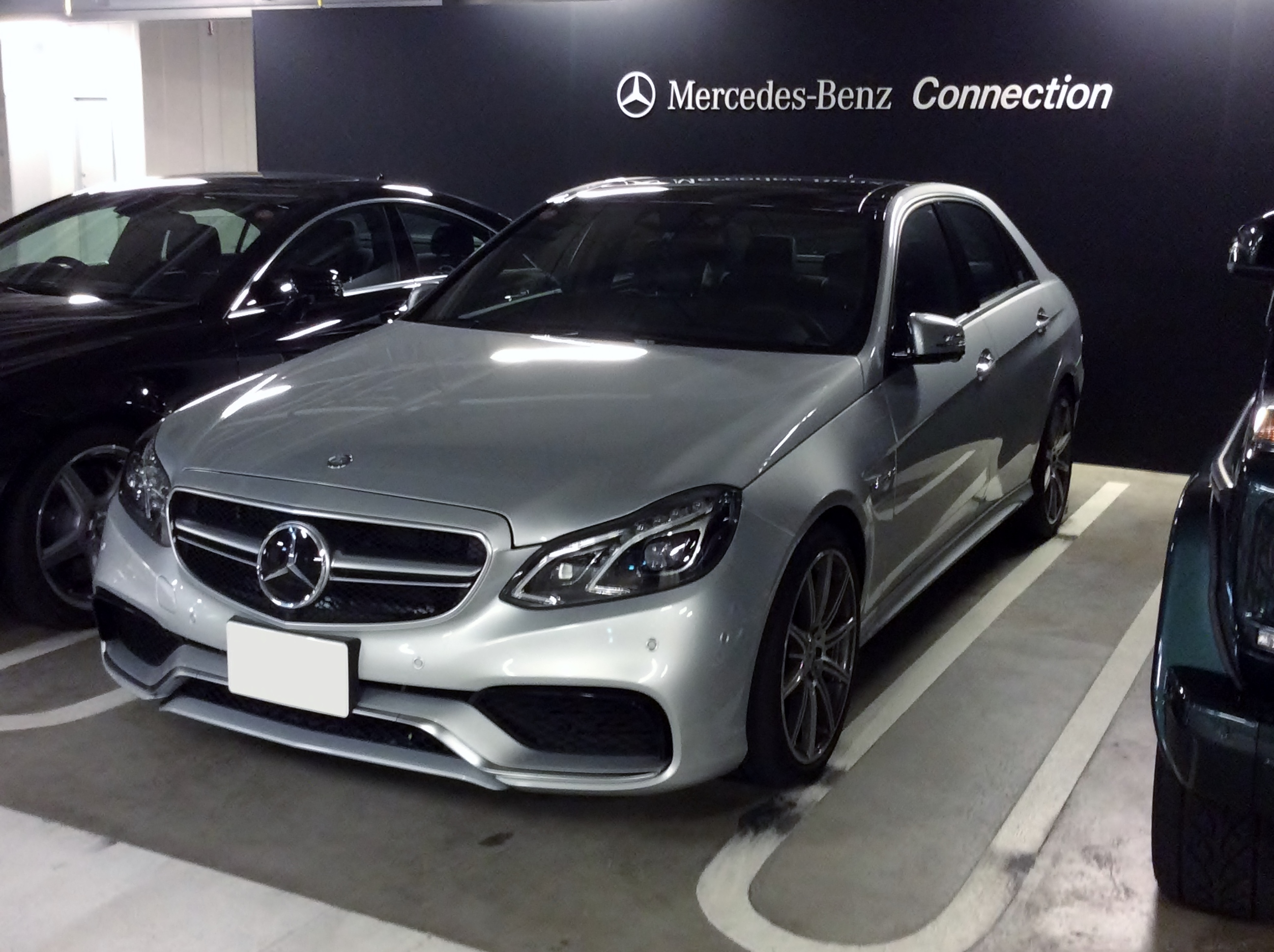 W212型メルセデスベンツE63 AMG 4MATICをフロントから撮影。